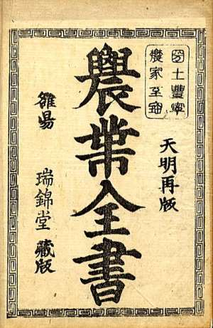 Миядзаки Ясусада. Ногё дзэнсё